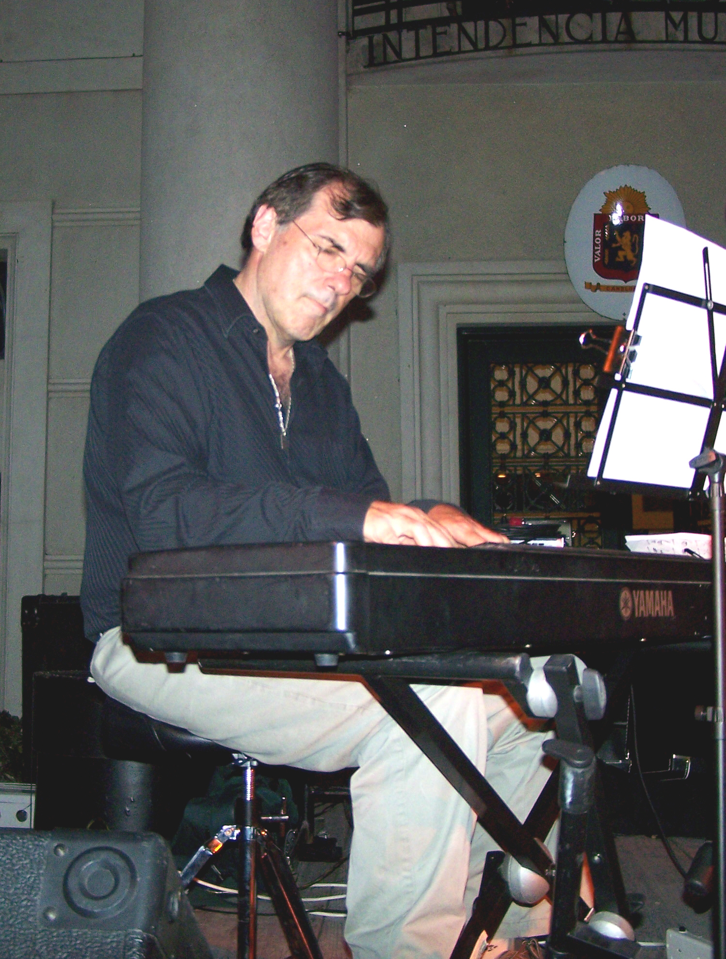 Fotografía de Alberto Magnone, pianista, compositor y director de orquesta uruguayo.